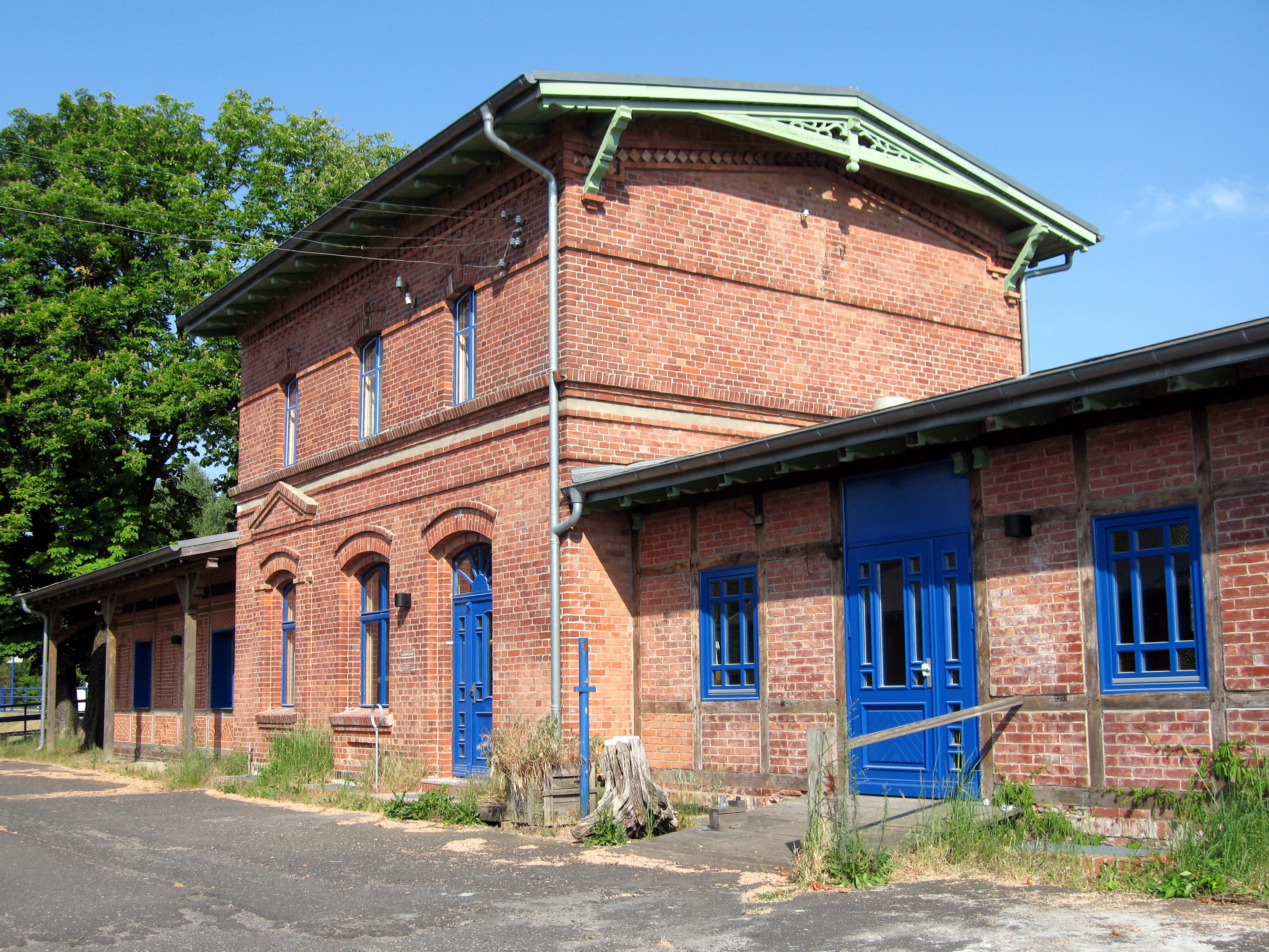 Altes Bahnhofsgebäude von Ruhlsdorf-Zerpenschleuse, Gemeinde Marienwerder, Landkreis Barnim, Land Brandenburg, Deutschland